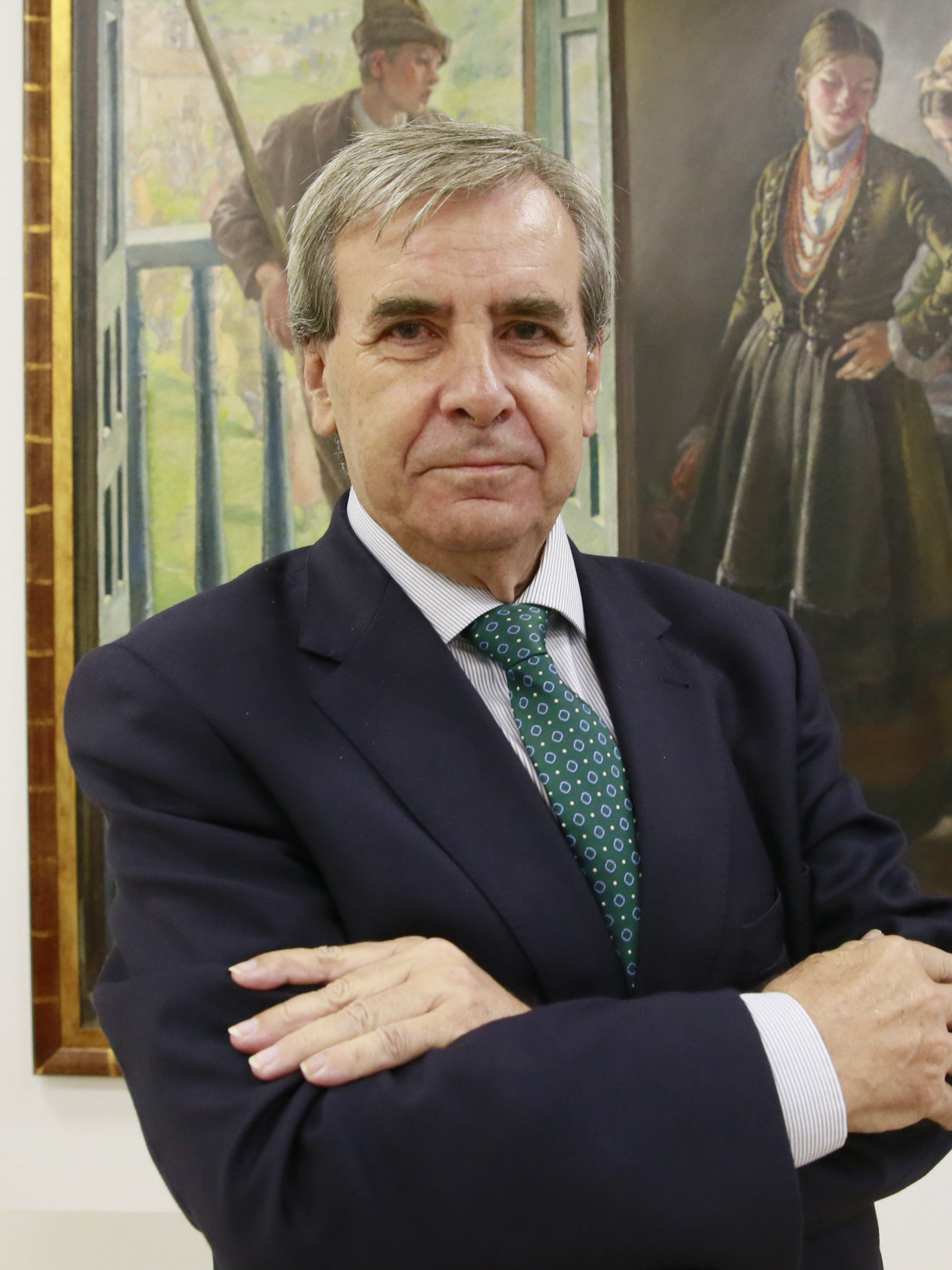 El Gobierno de Cantabria pide respeto para el presidente Revilla y solicita la apertura de un proceso de diálogo